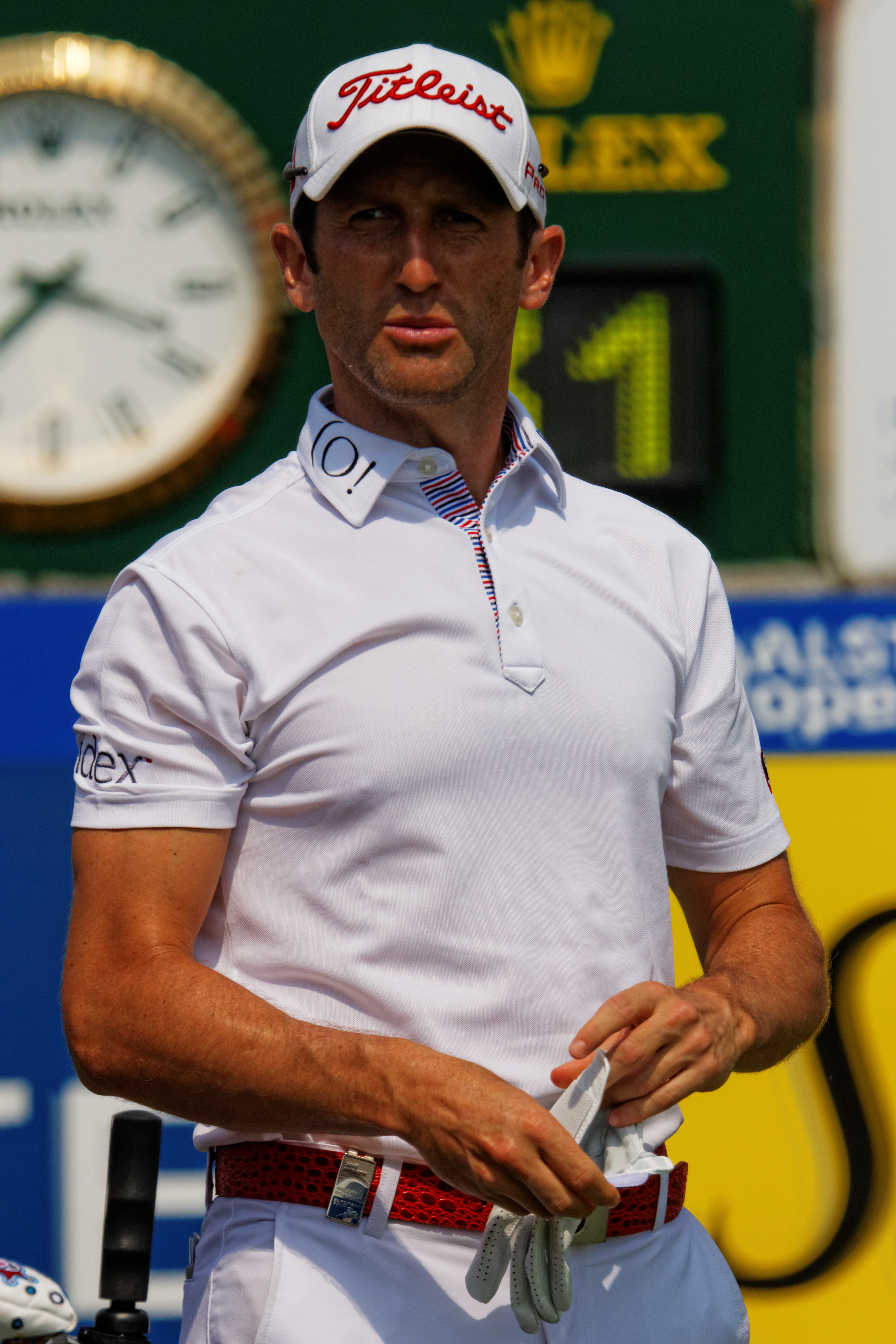 Photo prise lors de l'Alstom - Open de France 2015 à St Quentin en Yvelines